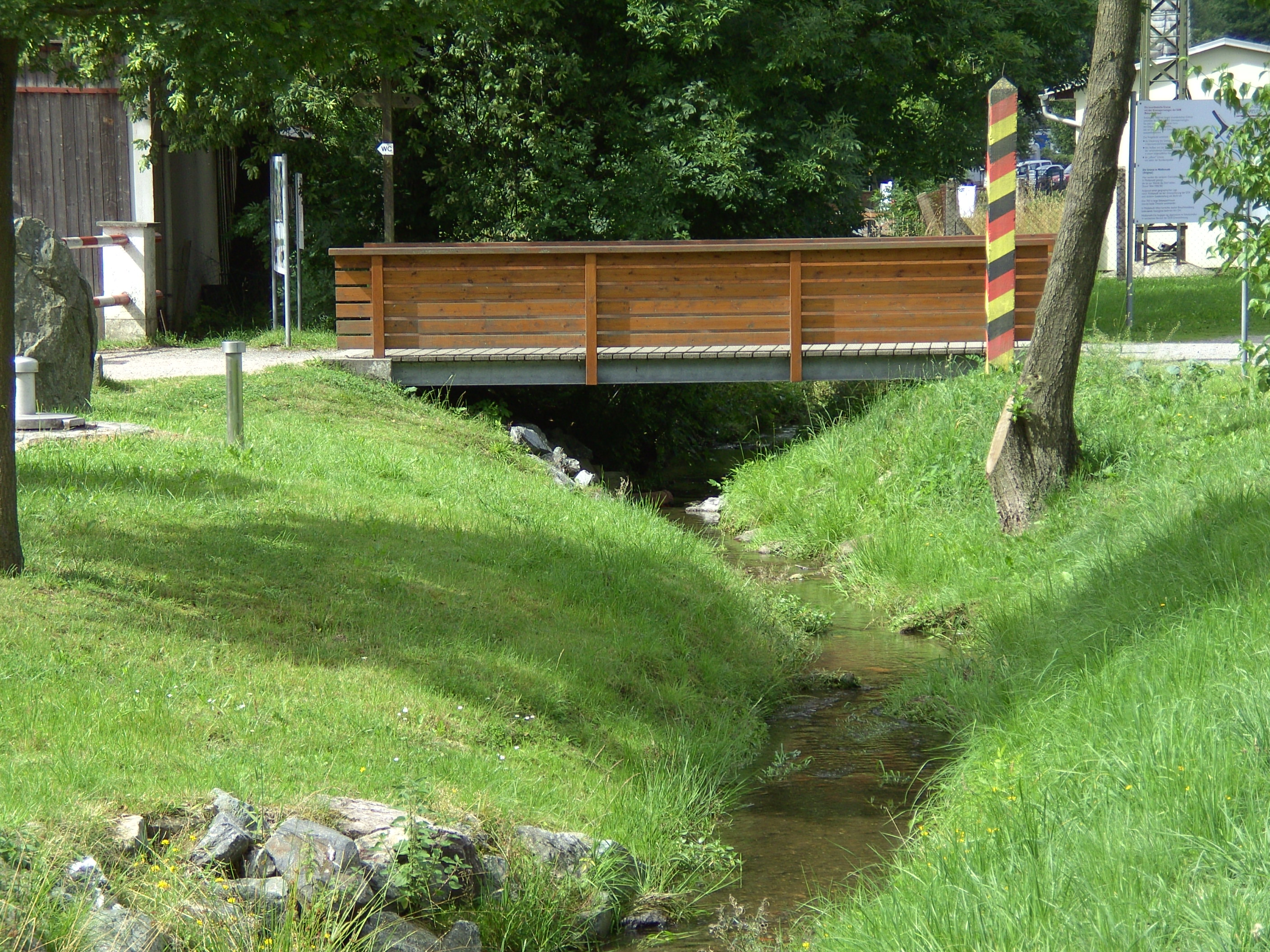 Tannbach in Mödlareuth